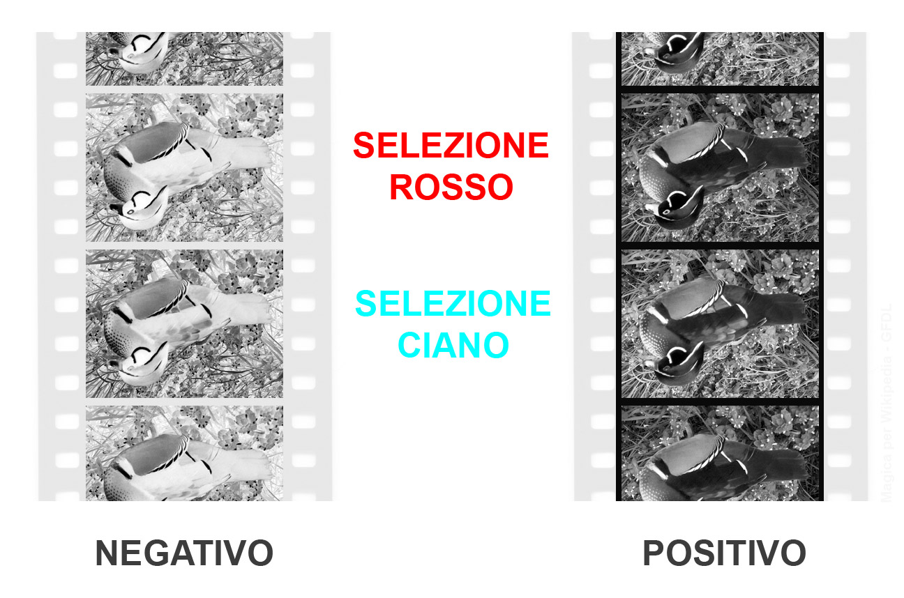 Nella figura sono mostrate la pellicola negativa ripresa dalla cinepresa e la pellicola positiva da proiezione usate nei sistemi cinematografici a colori in sintesi additiva rosso ciano, come il Technicolor Process 1.